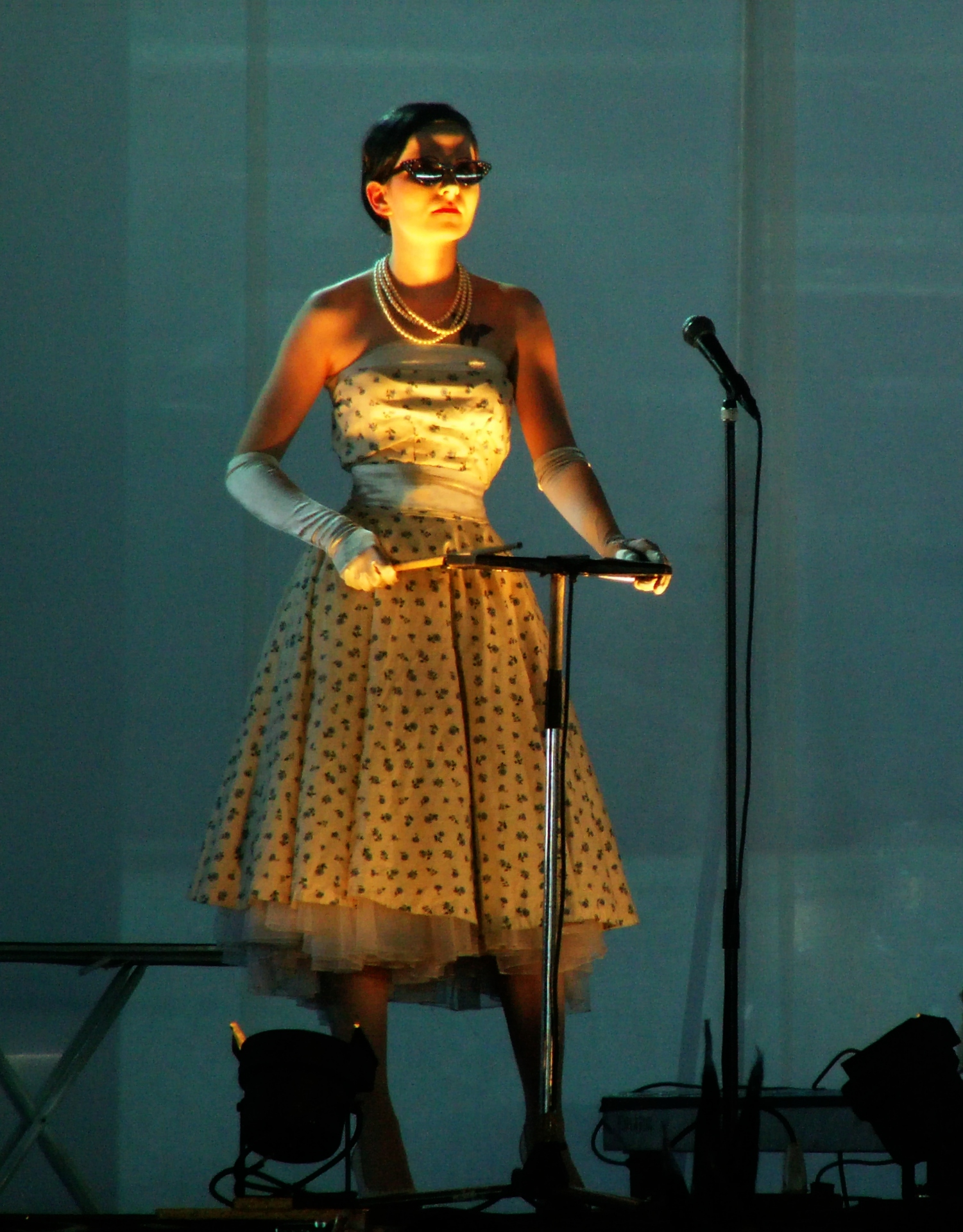 Die Musikerin Plastique (Stimme, Schlagwerk) von der deutschen Minimal-electro-Band Welle:Erdball, beim M’era Luna Festival 2007 in Hildesheim, Deutschland.